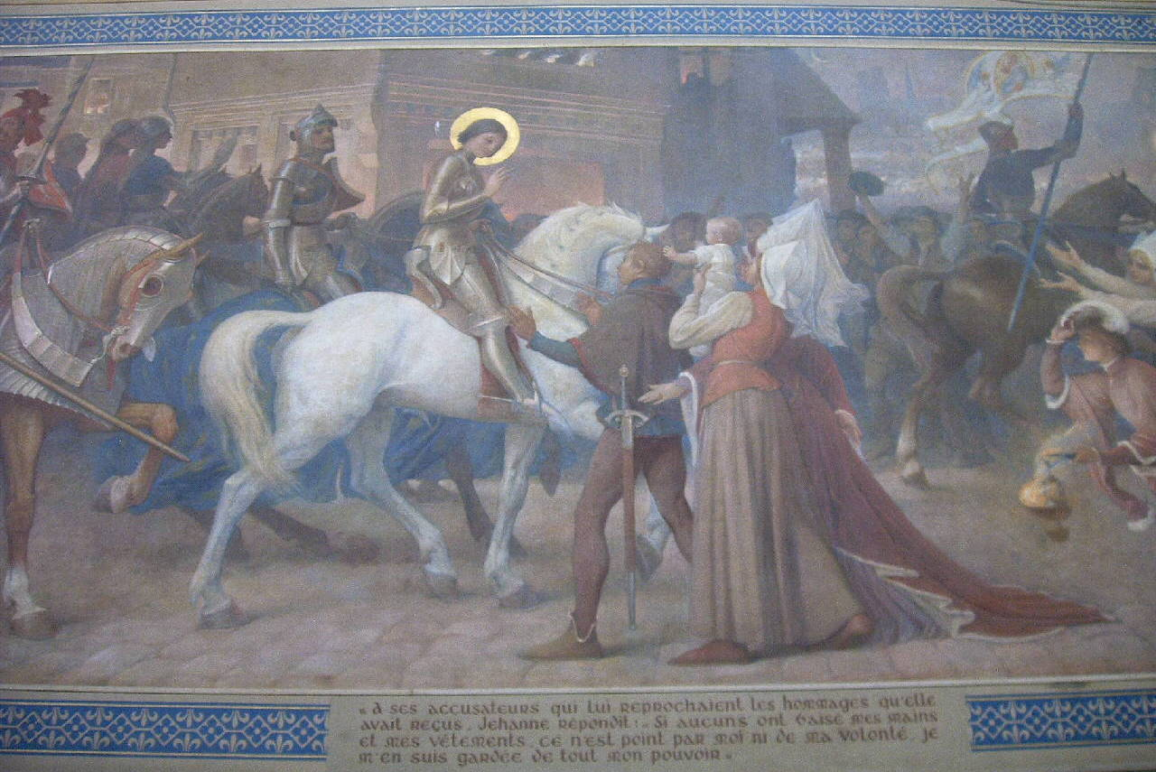 Scène de La Vie de Jeanne d’Arc par Lionel Royer dans la Basilique du Bois-Chenu (1910-1913).